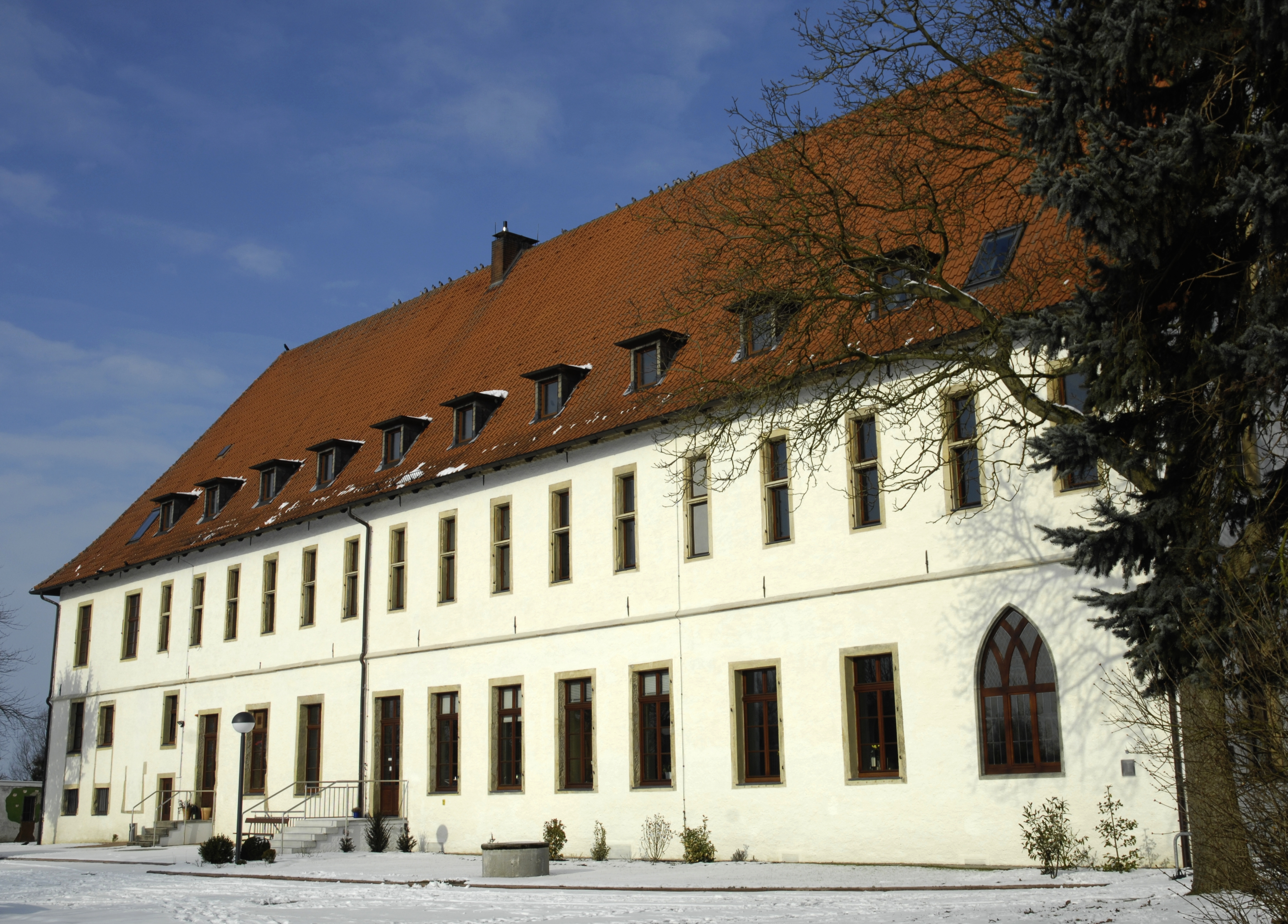 Stift Cappel bei Lippstadt, Hauptgebäude